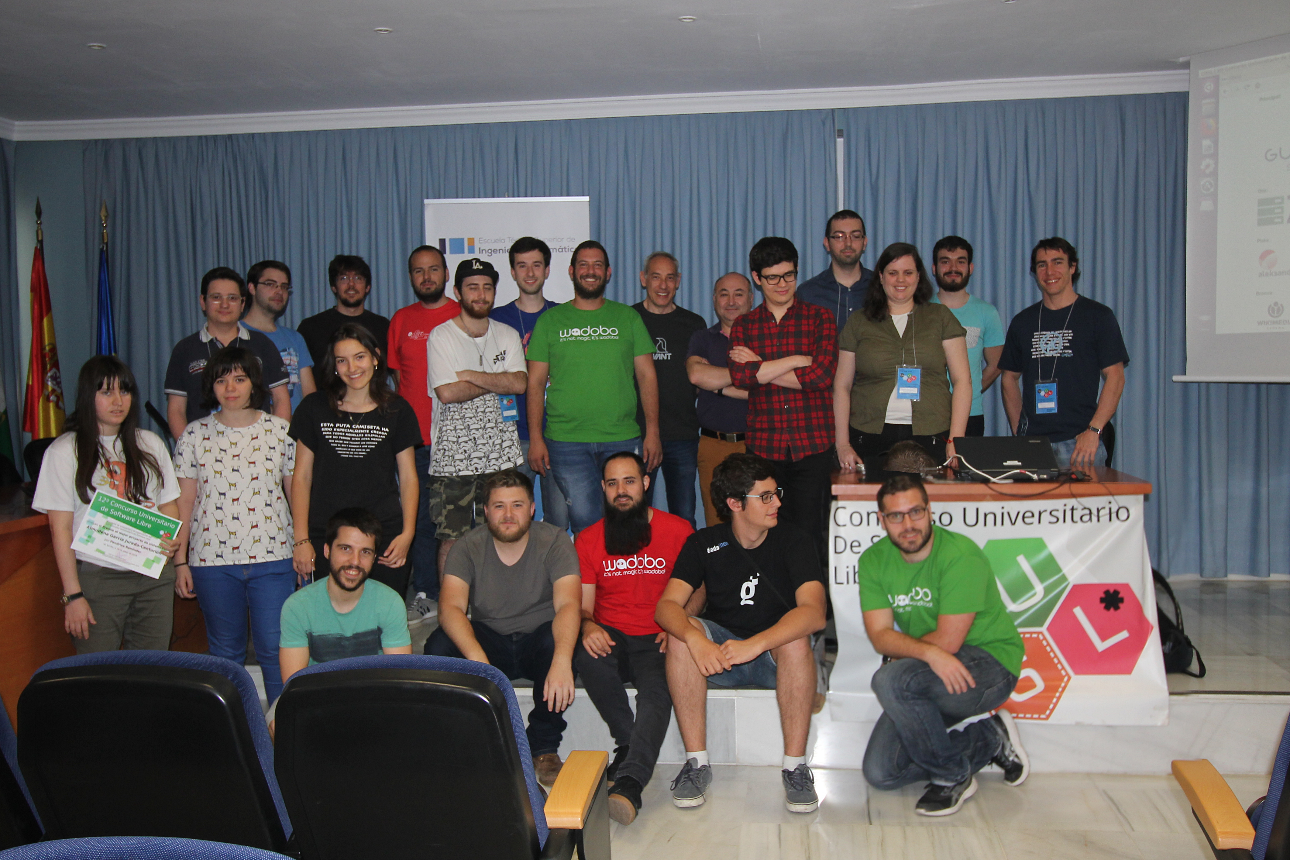 Foto de los premiados, organizadores, patrocinadores y algunos asistentes al Concurso Universitario de Software Libre de 2018